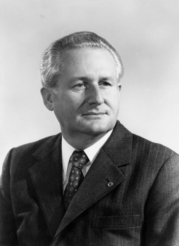 Günter Mittag ADN-ZB / DEWAG 28.6.1979 Dr. Günter Mittag Mitglied des Politbüros des ZK der SED, Mitglied des Staatsrates der DDR. Aufn.: April 1976 [Porträt Günter Mittag] Abgebildete Personen: Mittag, Günter Dr.: Stellvertretender Staatsratsvorsitzender, Politbüro des ZK der SED, FDGB, DDR (PND 11897629X)